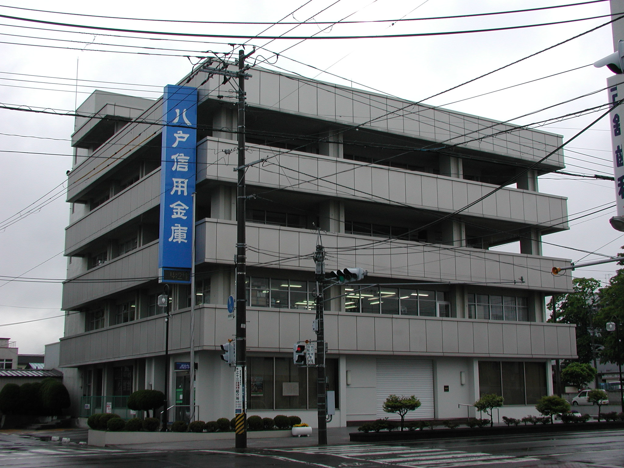 八戸信用金庫 十和田営業部（店番：028）